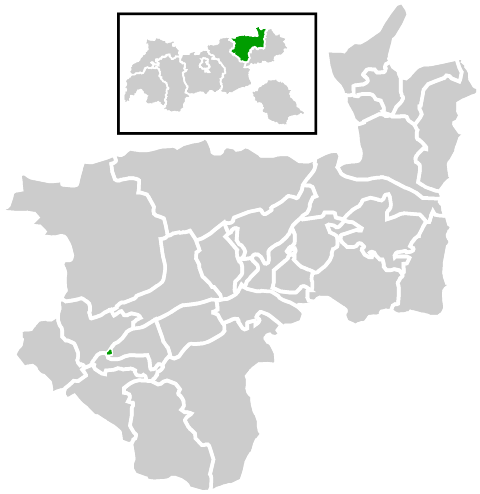 Lage der Gemeinde innerhalb des Bezirks Kufstein